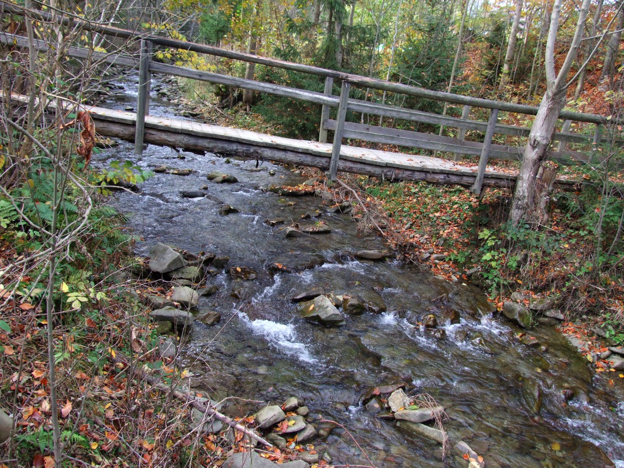 Łopuszanka - mostek przez który prowadzi niebieski szlak turystyczny na Turbacz